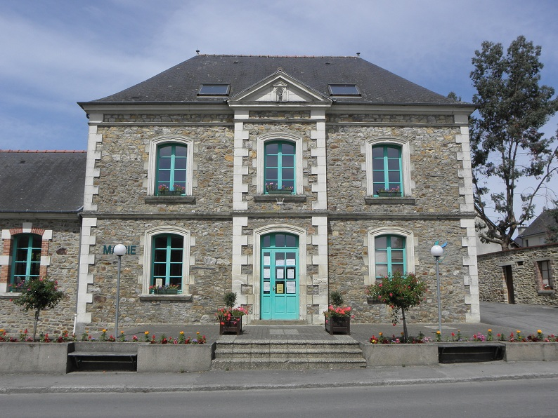 Mairie de Taillis (35).